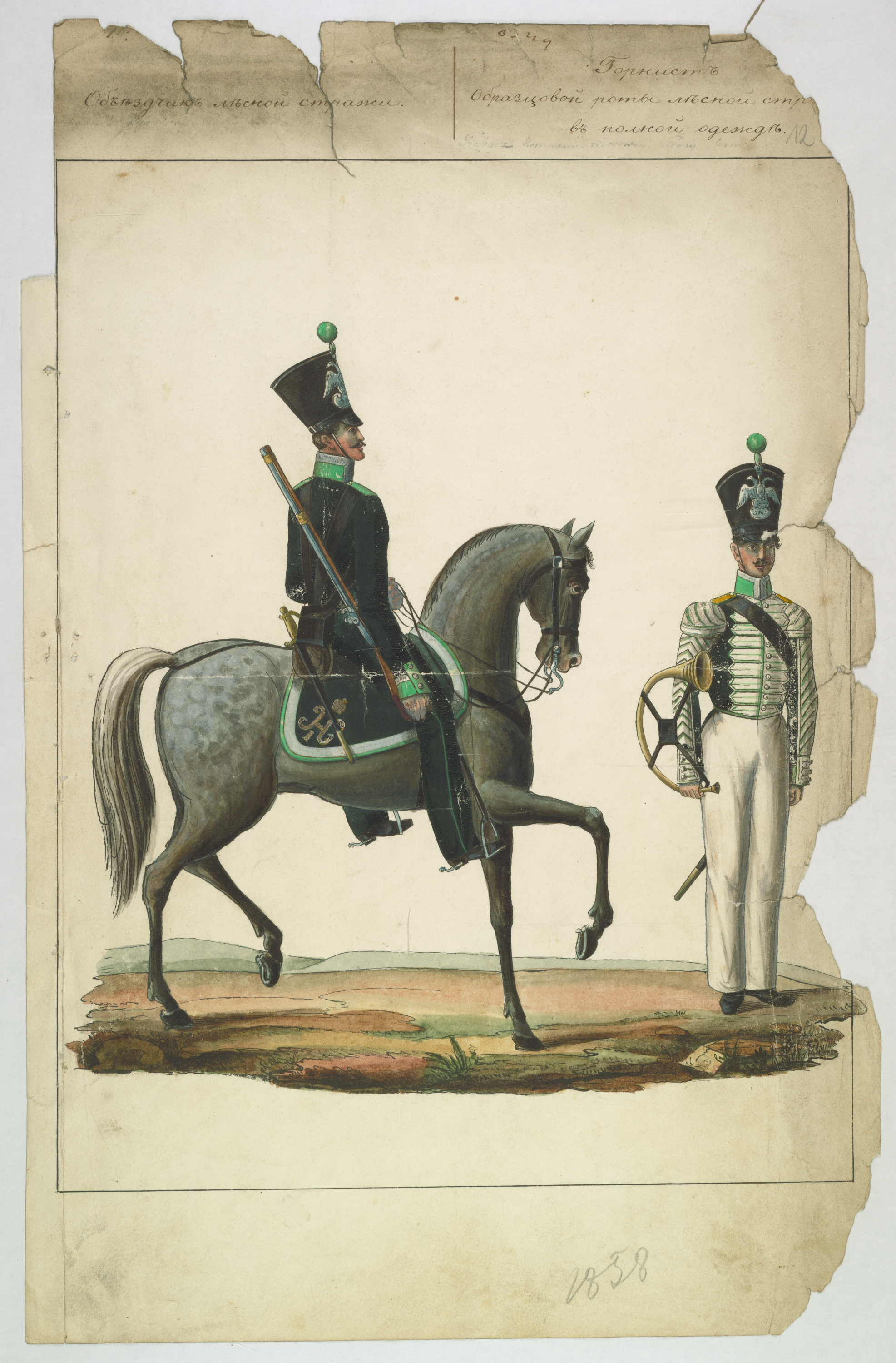 Przepisy dotyczące mundurów dla urzędników leśnych – wzory mundurów.